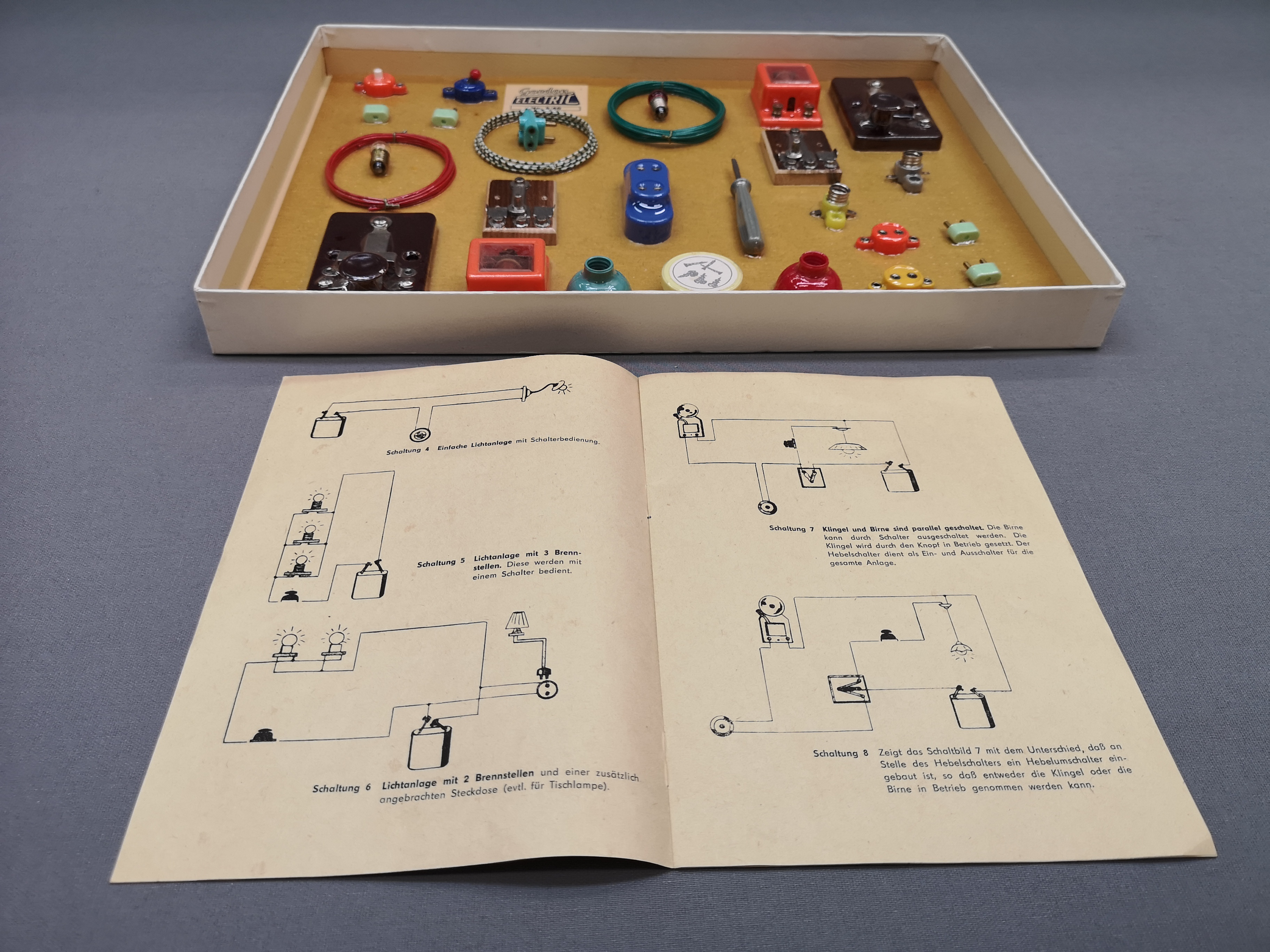 Lernspiel für Jugendliche in der DDR aus der Sammlung der Alltagsgegenstände im Museum Europäischer Kulturen